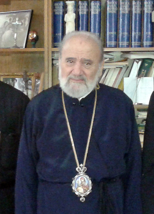 Την Τρίτη, 25 Μαρτίου 2014, ο κ. Γεροντόπουλος επισκέφθηκε το Σίδνευ όπου συναντήθηκε με τον Αρχιεπίσκοπο Αυστραλίας κ. Στυλιανό.